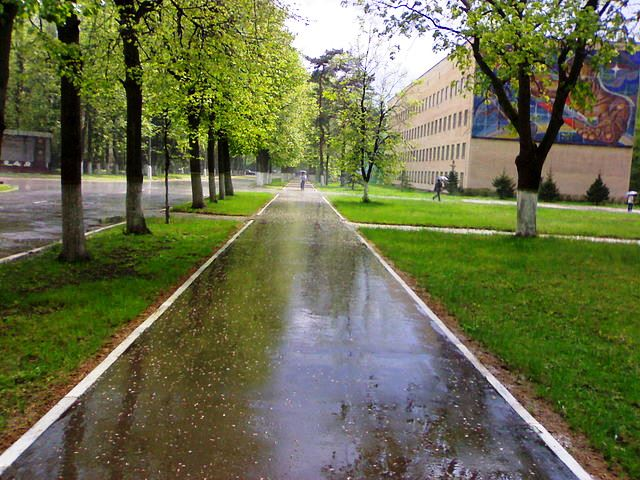 ВВА имени Ю.А. Гагарина. Внутренняя территория.